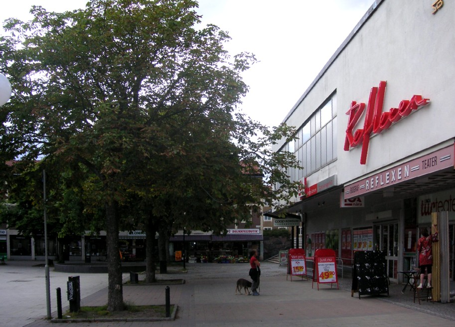 Kärrtorps centrum